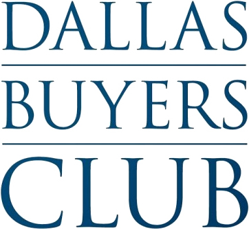 Logotipo de la película biográfica Dallas Buyers Club, dirigida por Jean-Marc Vallée y ptrotagonizada por Matthew McConaughey, Jared Leto, Jennifer Garner y Steve Zahn en 2013.